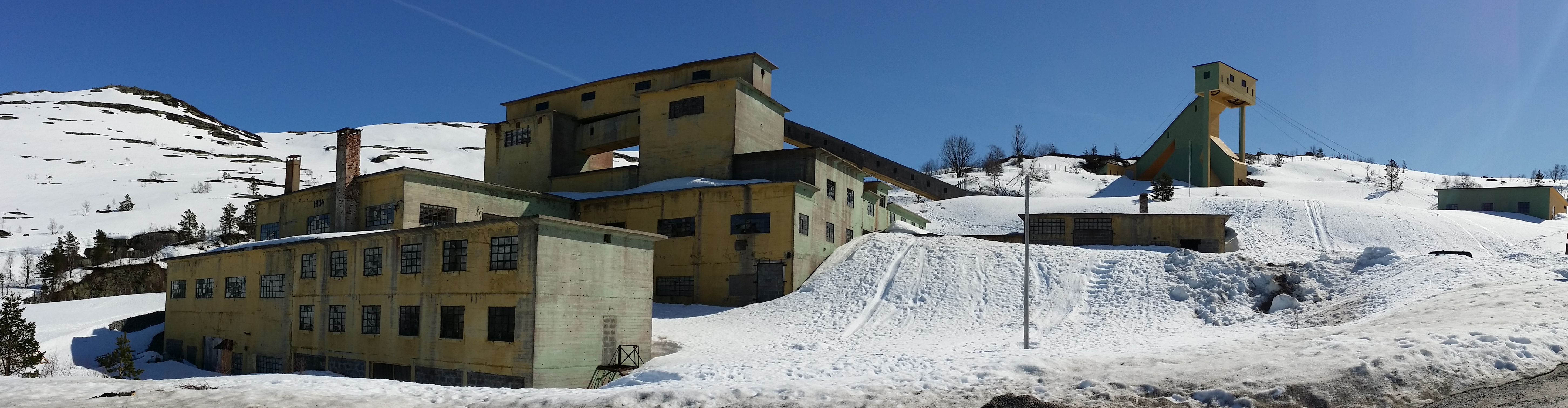 Knaben gruver april 2014